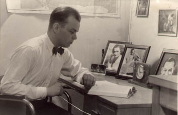 Tage Ammendrup árið 1946 þegar Íslenskir tónar voru á teikniborðinu